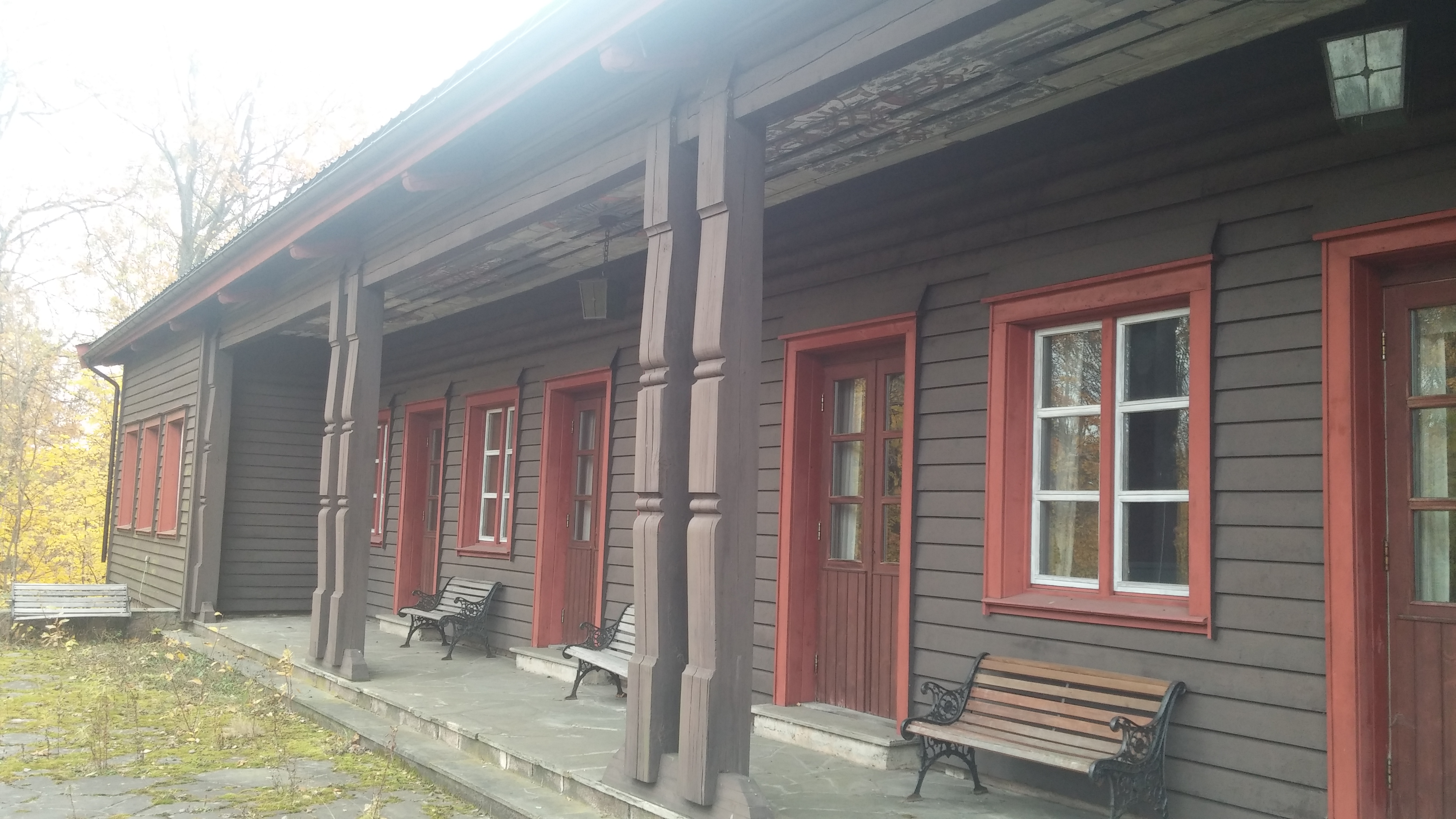 Offisersmessen Casino i Grefsrudleiren ved Holmestrand, bygget av tyskerne under andre verdenskrig, også benyttet til utdannelse av frontkjempere og hirdens vaktmannskaper til fangeleire